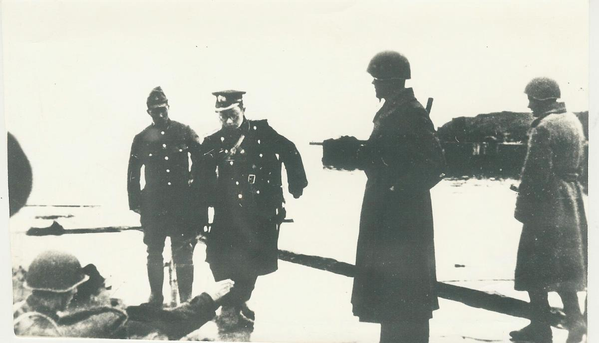 Генерал-Лейтенант Цуцуми Фусаки, командующий войсками северо-курильских островов, прибыл в расположение советских войск для переговоров о капитуляции гарнизонов островов.